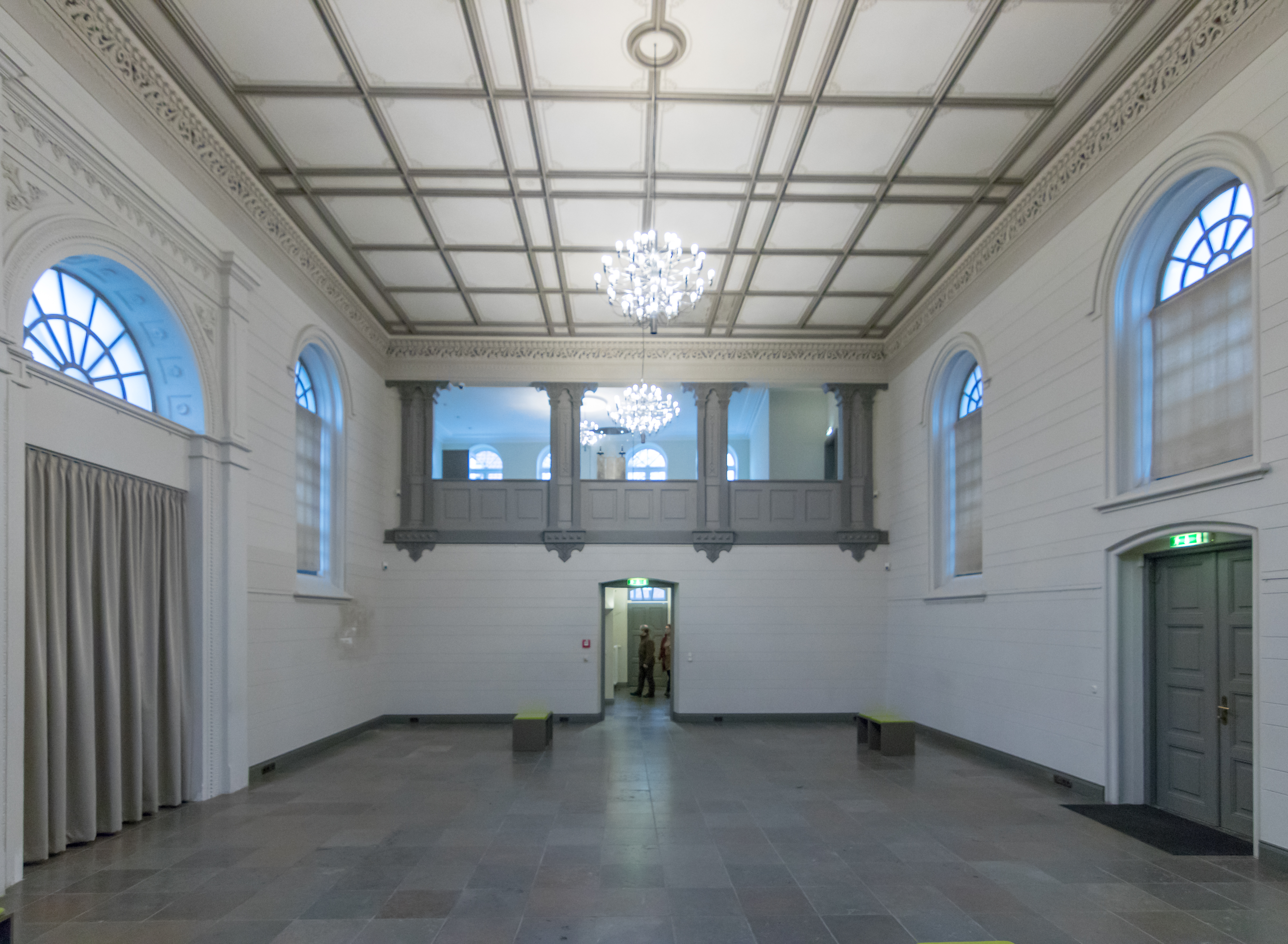 Jüdisches Museum Rendsburg - Blick in den Gebetsraum